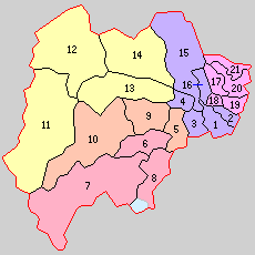 山形県西村山郡の町村。